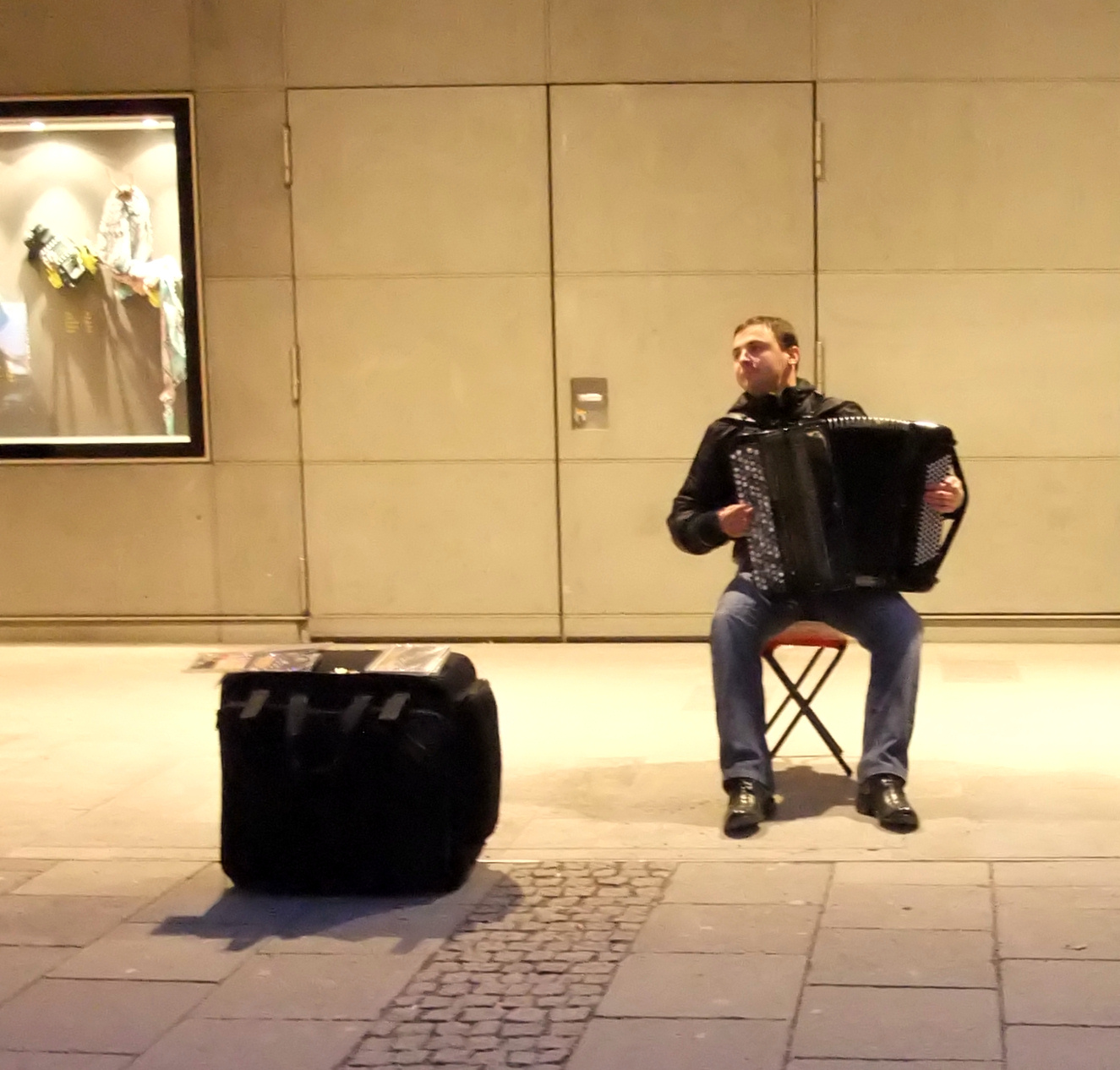 Straßenmusikant in München, Sendlinger Straße